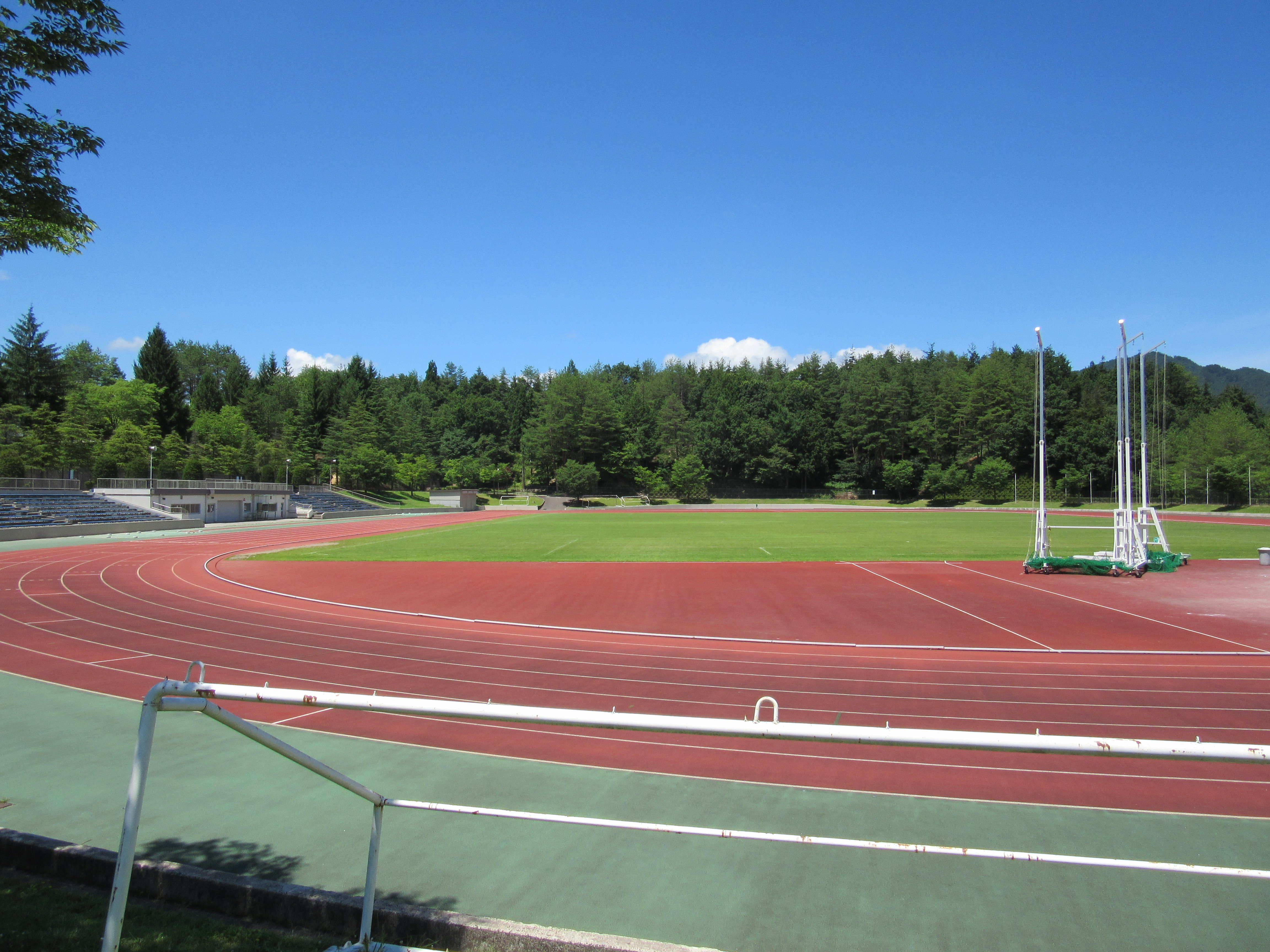 中山公園陸上競技場